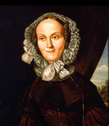 Amalie Sieveking (1794-1859) war eine Mitbegruenderin der organisierten Diakonie in Deutschland.